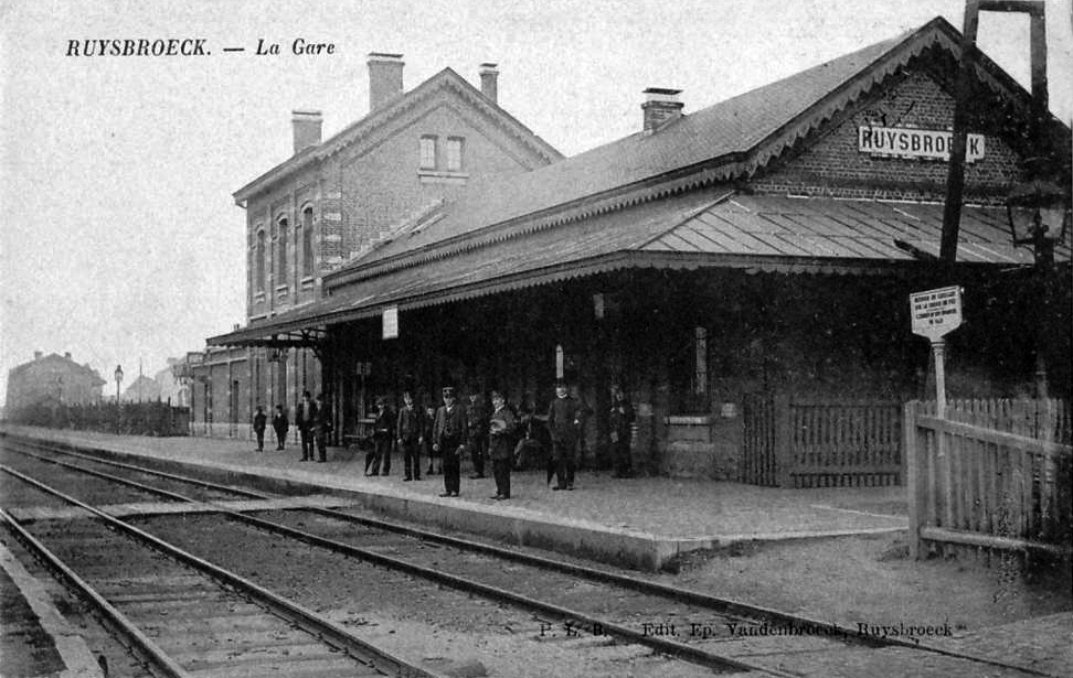 Intérieur de la gare de Ruisbroek, vers 1900.